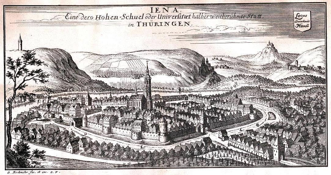 Alter Stich von etwa 1720. Gestochen von Bodenehr. Persönlicher Besitz